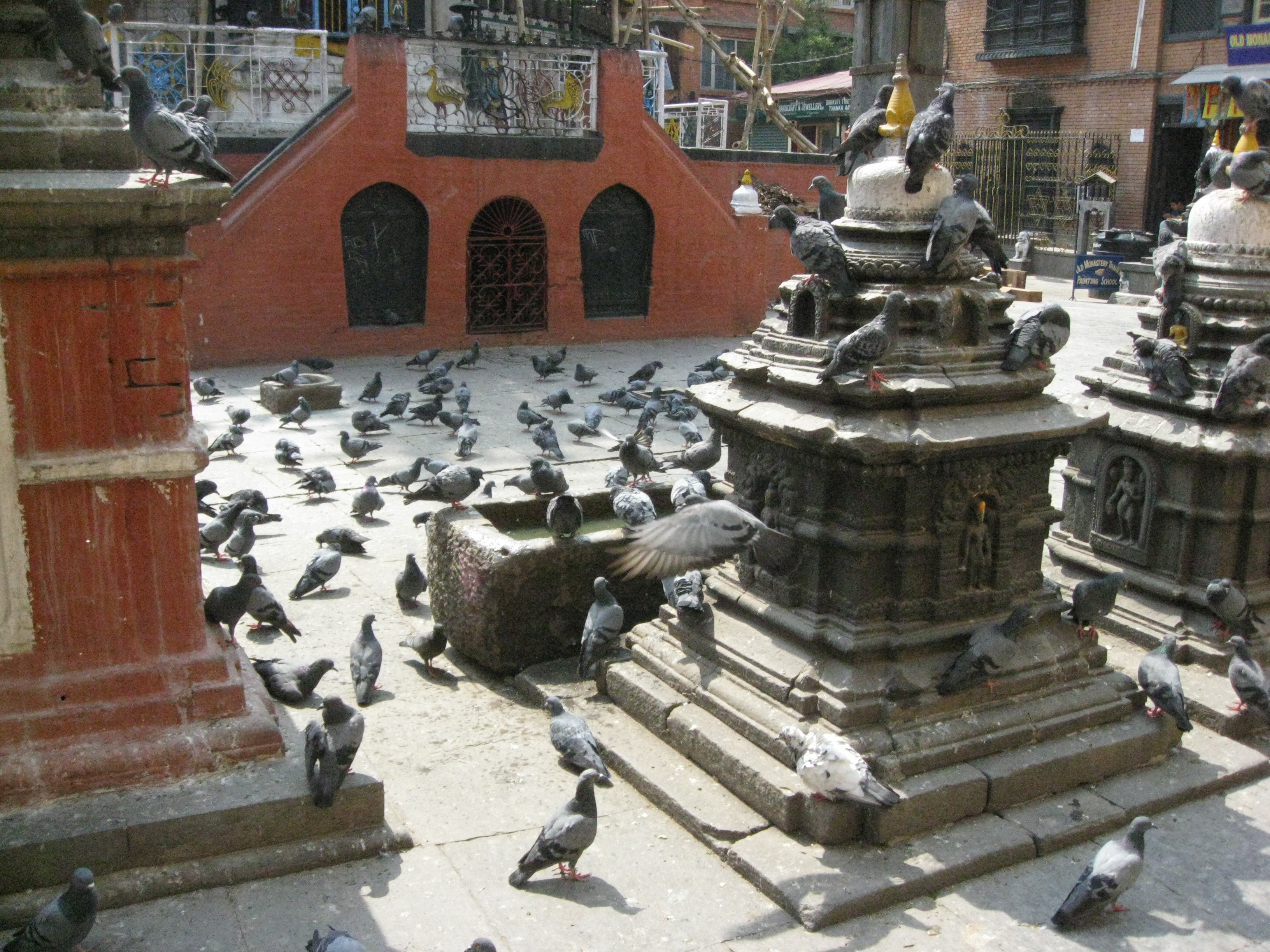 Kathmandu